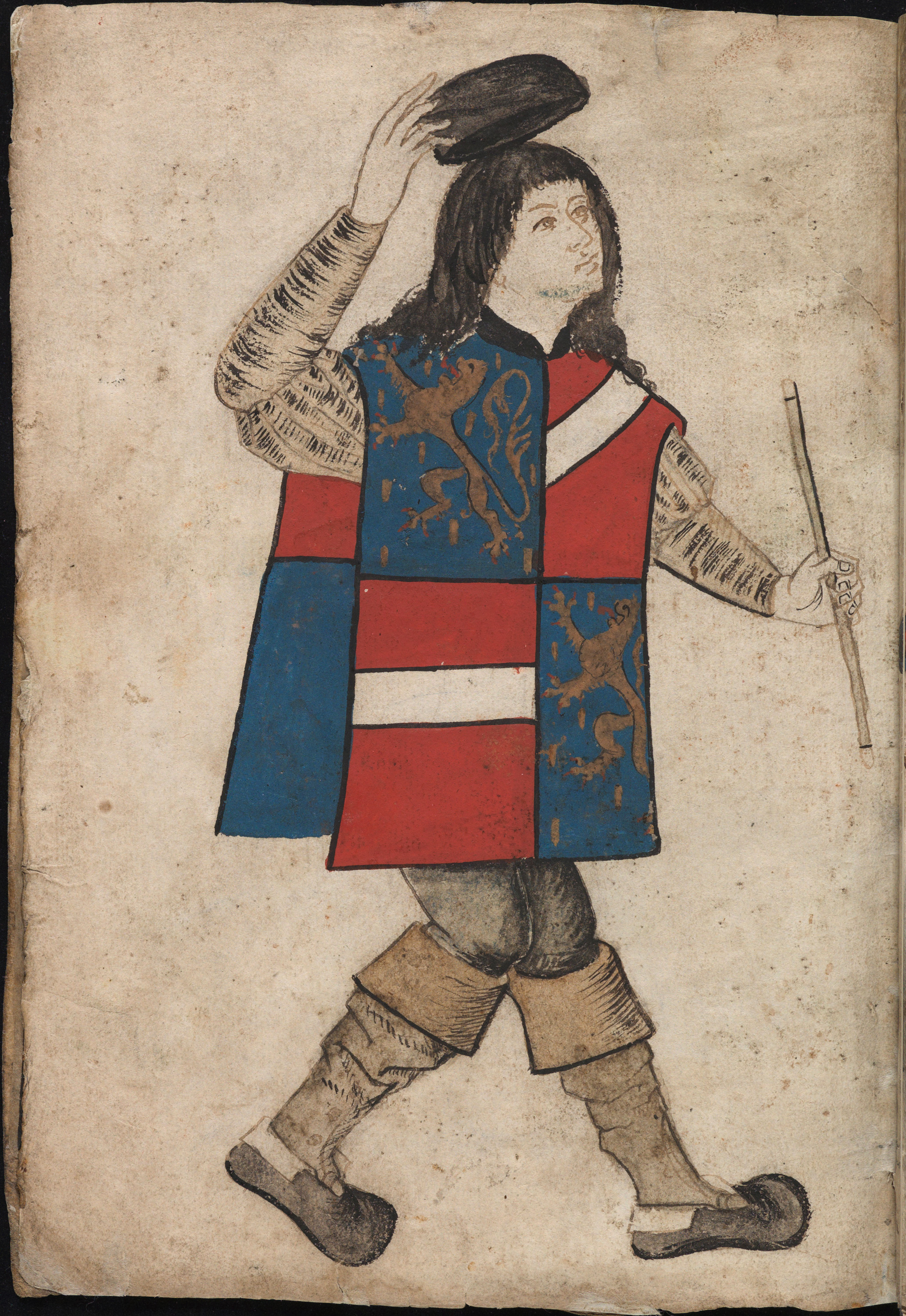 Herauten zijn de deskundigen bij uitstek op het terrein van de wapenkunde of heraldiek. Zij zijn in staat om heraldische tekens te 'lezen' en hun dragers te identificeren - een onmisbaar talent in oorlogstijd, vooral op het slagveld. In vredestijd stonden herauten klaar voor het organiseren van toernooien. Hun kennis legden zij vast in wapenboeken. Een heraut is herkenbaar aan zijn wapenrok met de heraldische tekenen van zijn heer. Zo ook deze heraut, die op zijn tabberd de wapens draagt van Nassau en van Vianden: de graafschappen van zijn heer Engelbrecht II van Nassau (1451-1504). Heraut Nassau-Vianden mogen we verantwoordelijk houden voor de samenstelling van dit wapenboek. Hier neemt hij in een groet zijn hoofddeksel af voor het tegenoverstaande wapen van zijn heer. [zie ook fol. 17v]